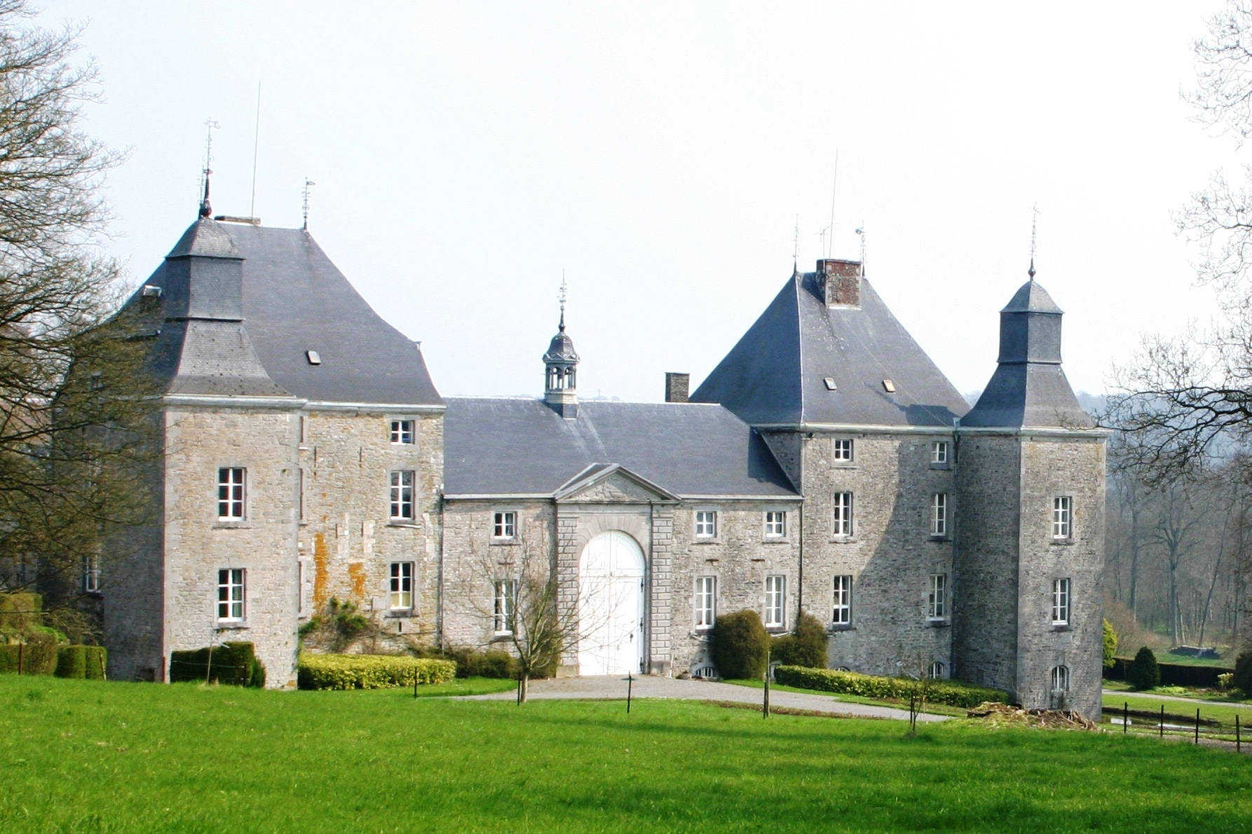 D'Schlass vun Houchenée. Houchenée Houchenée Schlass